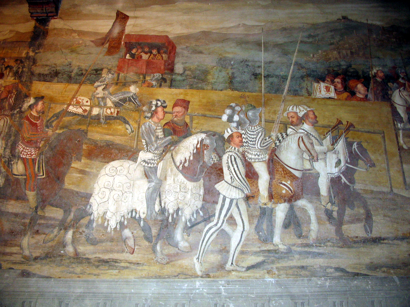 Il Romanino, Cristiano I di Danimarca assiste ad un torneo assieme a Bartolomeo Colleoni (1467). Dettaglio. Affresco del Castello di Malpaga, già di Bartolomeo Colleoni. Foto di Giorces.